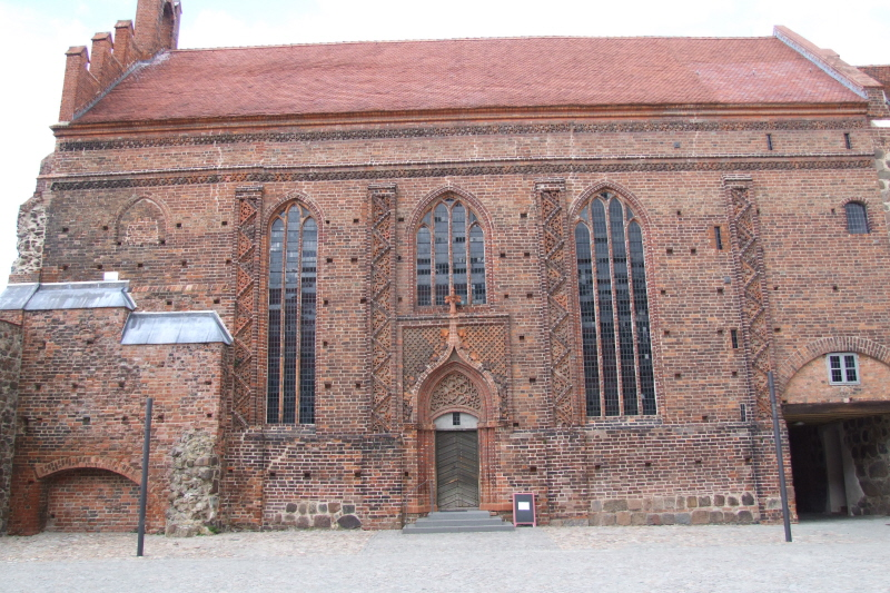 Auf der Burg Ziesar in Ziesar: Burgkapelle, Front zum Burghof